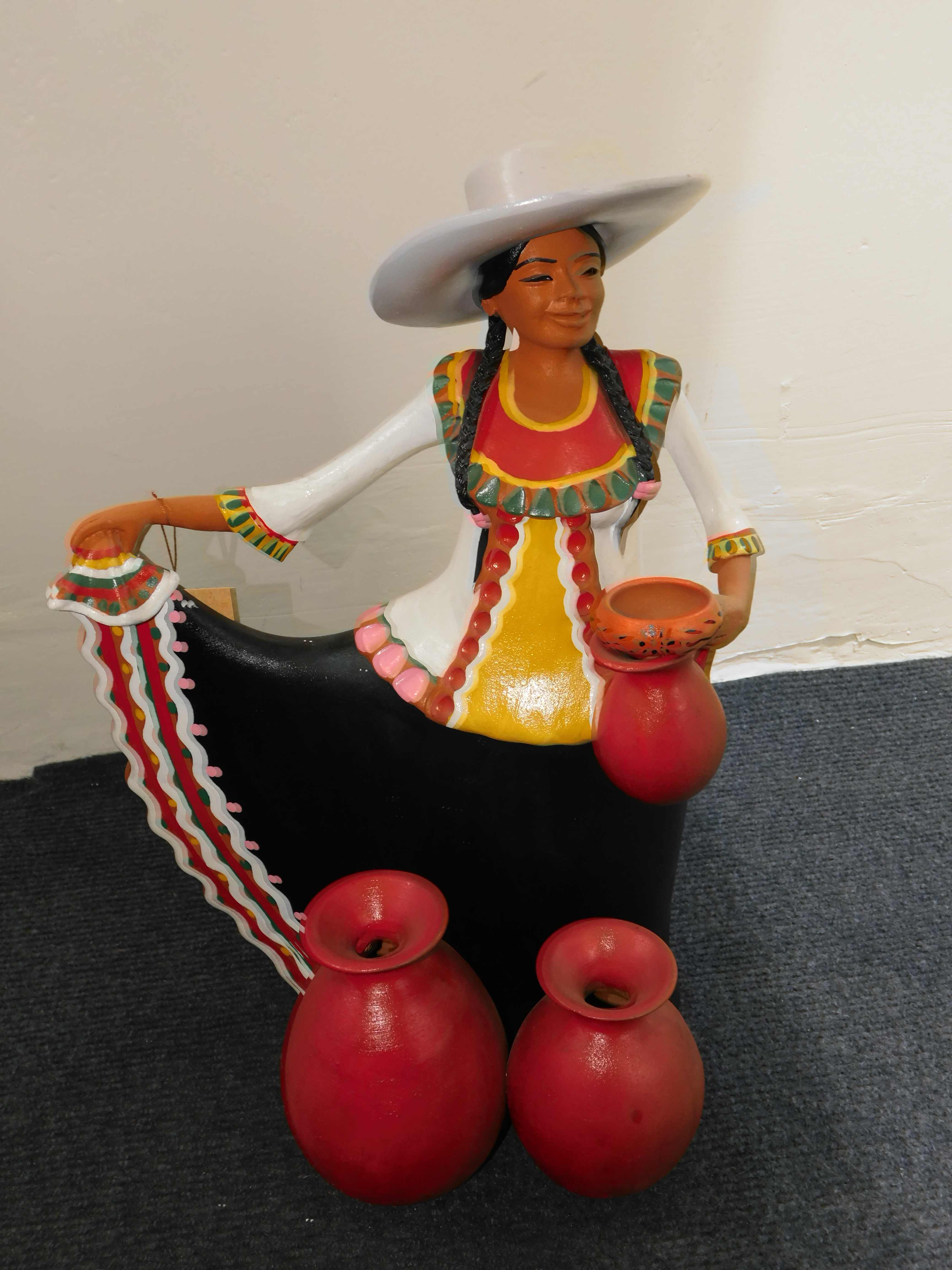 Cerámica tipica del distrito de Chulucanas, elaborada por destacados artesanos de la región